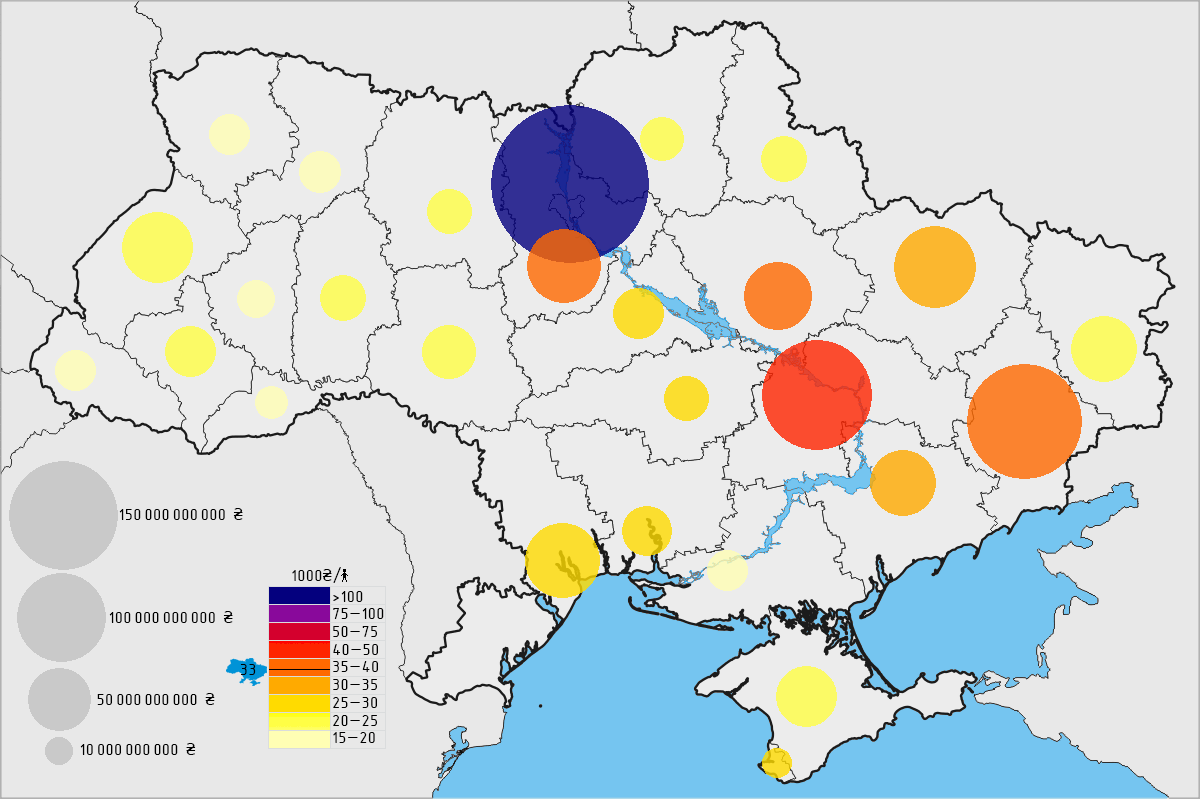 2013 площадь кружков соответствует размеру ВРП